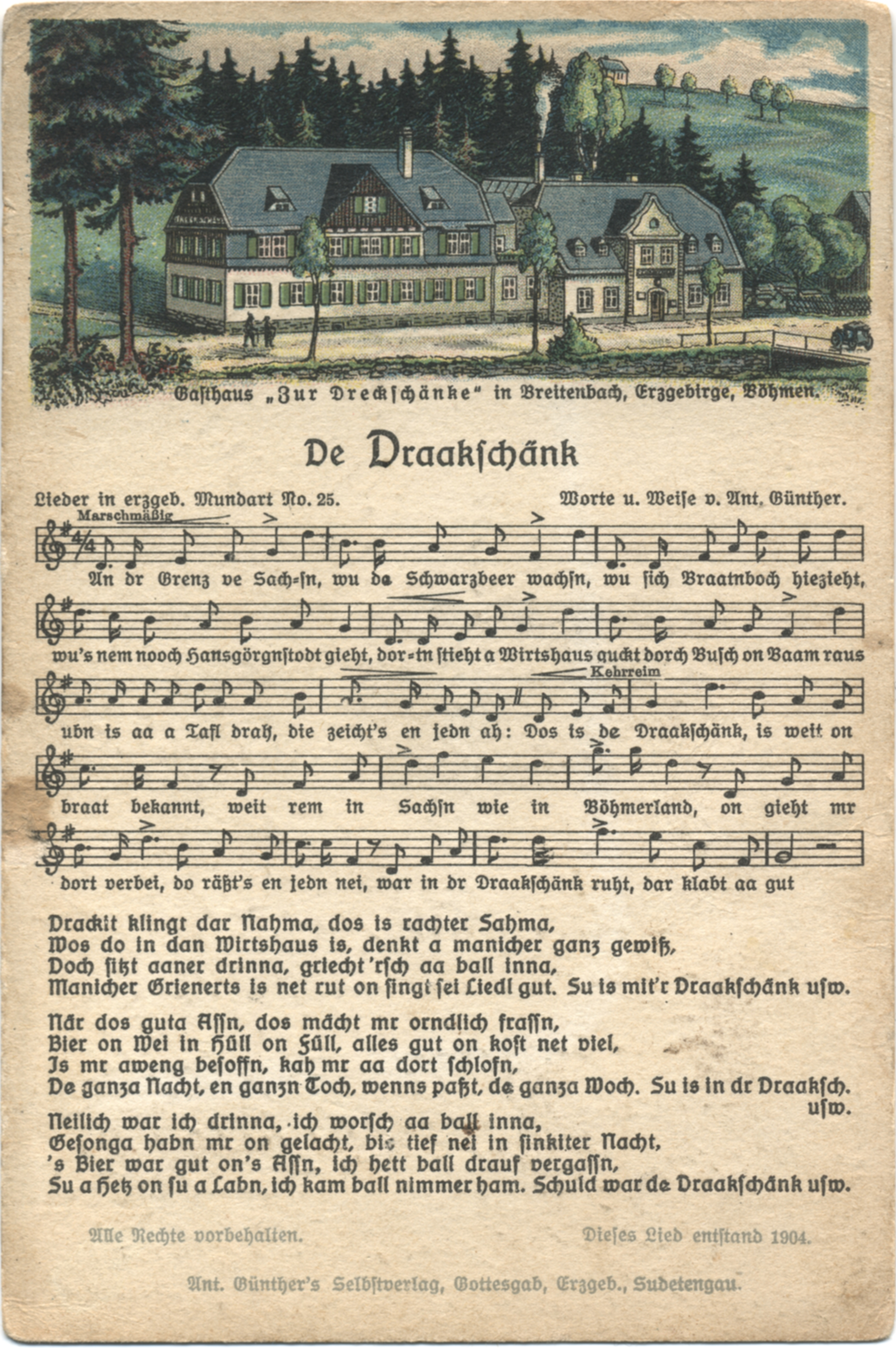 Liedpostkarte von Anton Günther Nr. 25 "De Draakschänk"